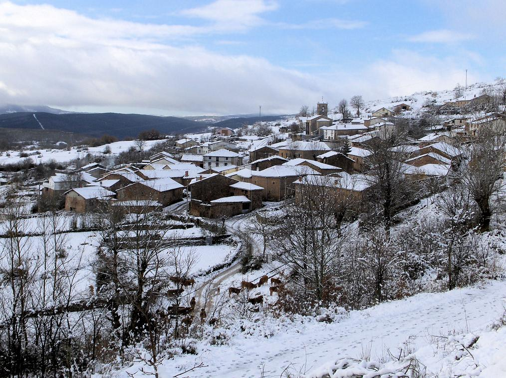 Bustillo del Monte nevado desde el monte nevado